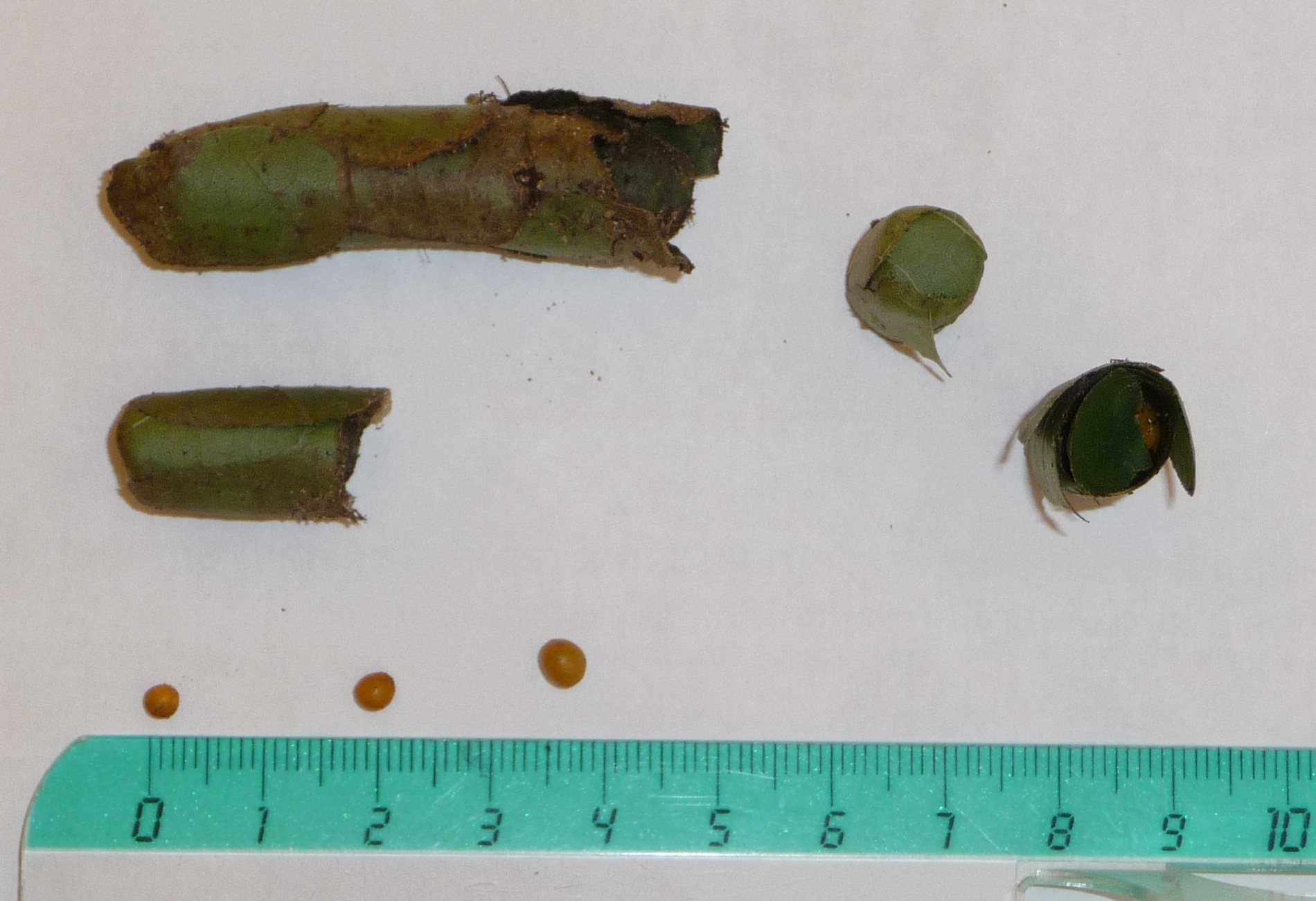 Cocons et grains de pollen trouvés enterrés dans une jardinière exposée plein sud, à Vitry-Sur-Seine (Val-de-Marne, France).